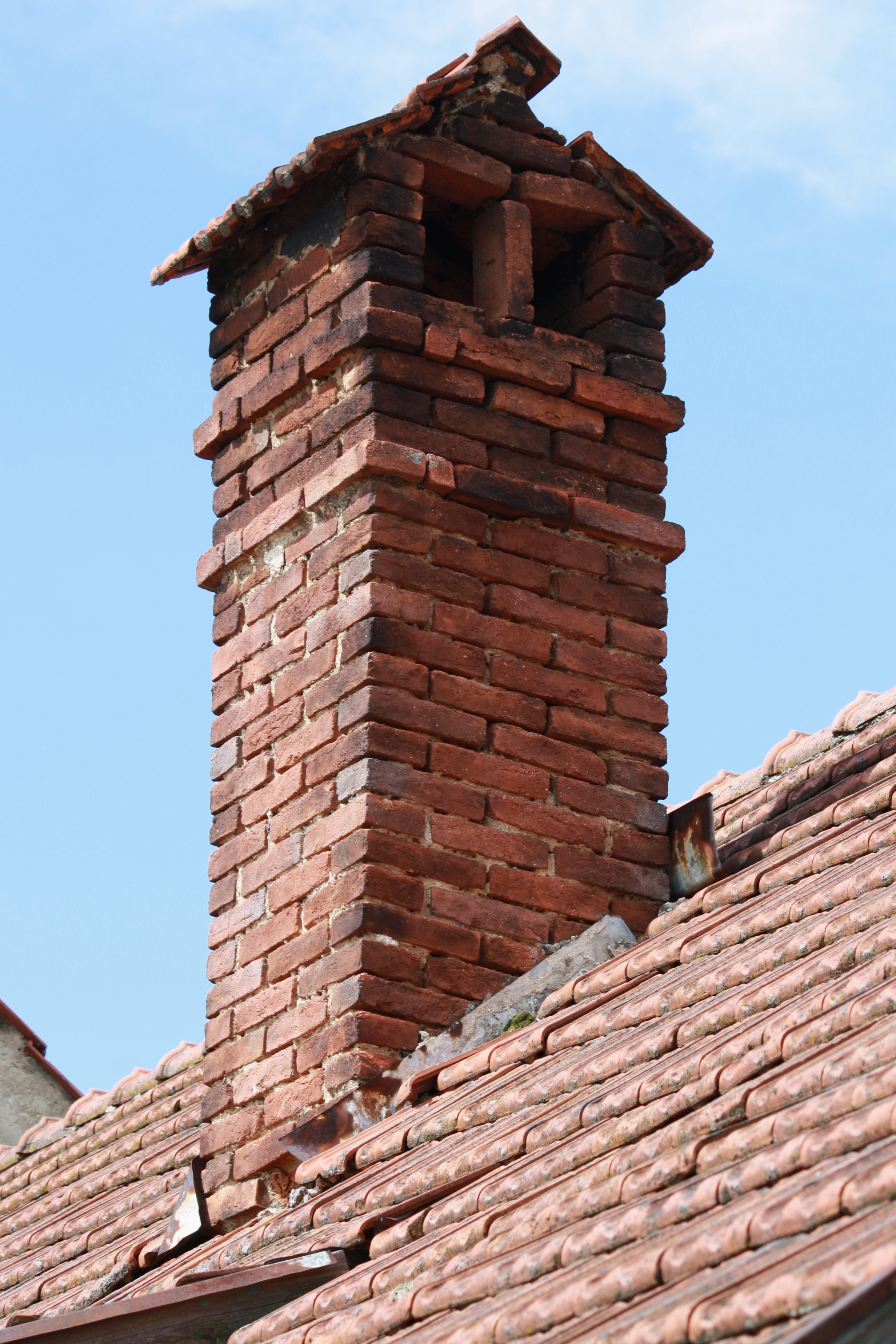 Bukov - neomítnutý zděný komín This photograph was taken within the scope of the 'Czech Municipalities Photographs' grant. This photograph was taken with a DSLR from WMCZ's Camera grant.